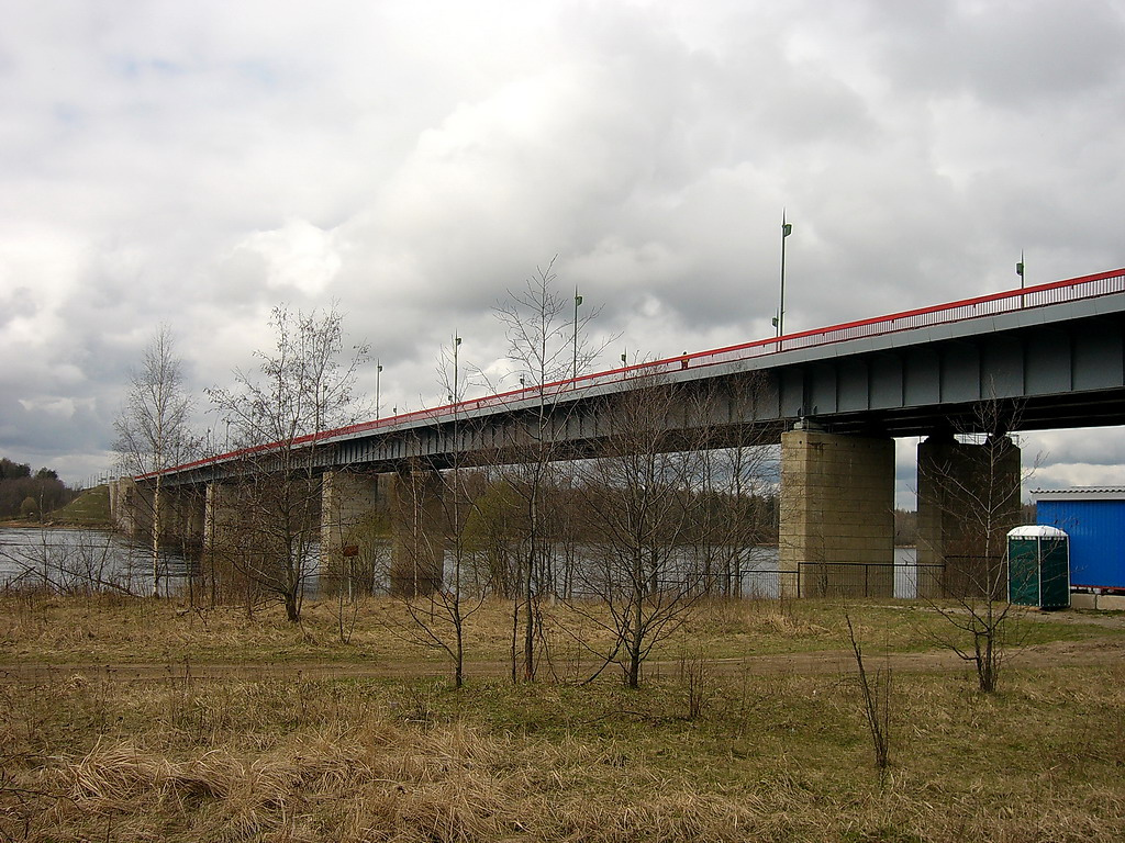 Ladozhsky Bridge